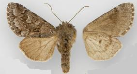 Lasionycta skraelingia female